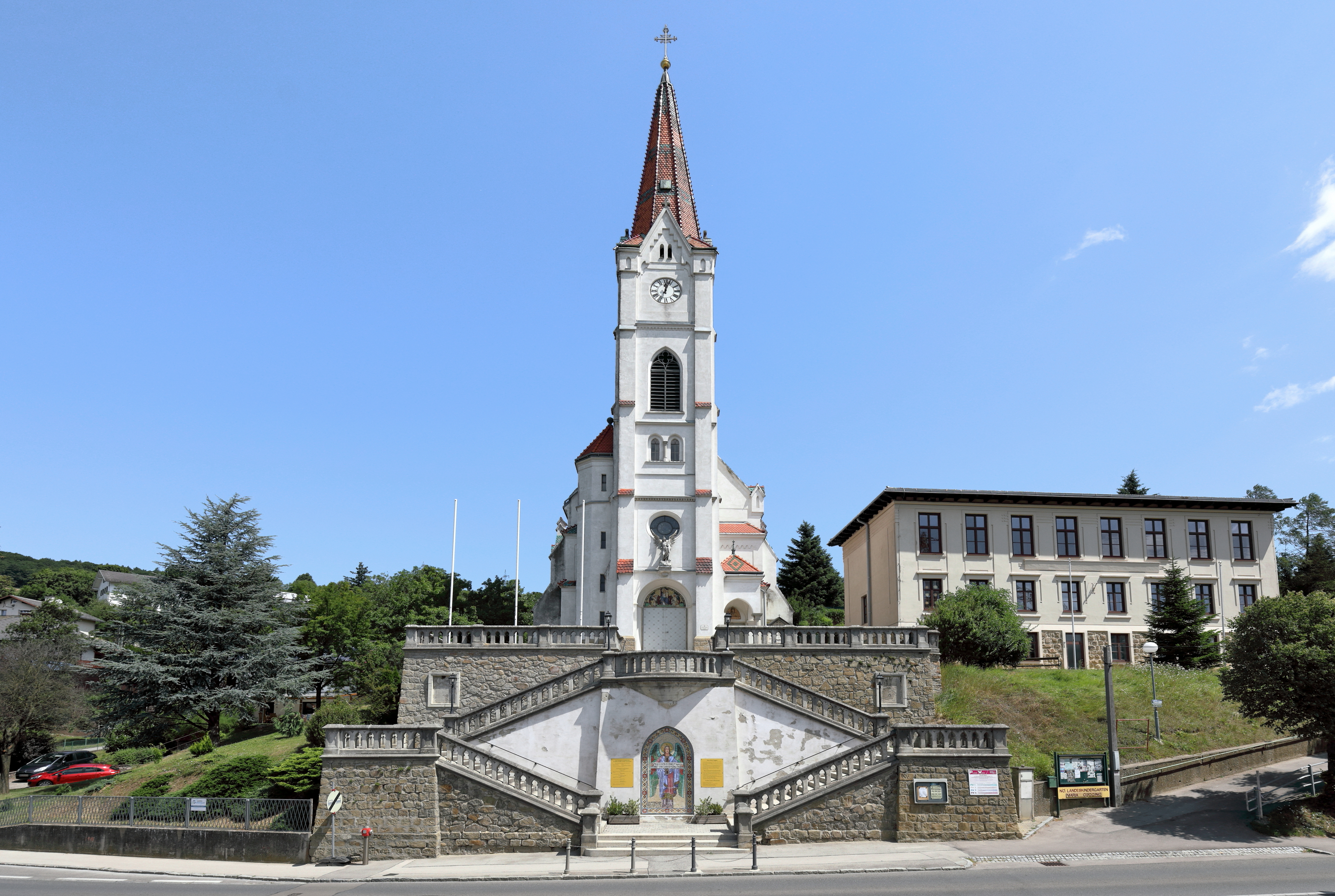 Südwestansicht der Pfarr- und Wallfahrtskirche Maria Königin der Engel in Maria Gugging, ein Ortsteil der niederösterreichischen Stadt Klosterneuburg.